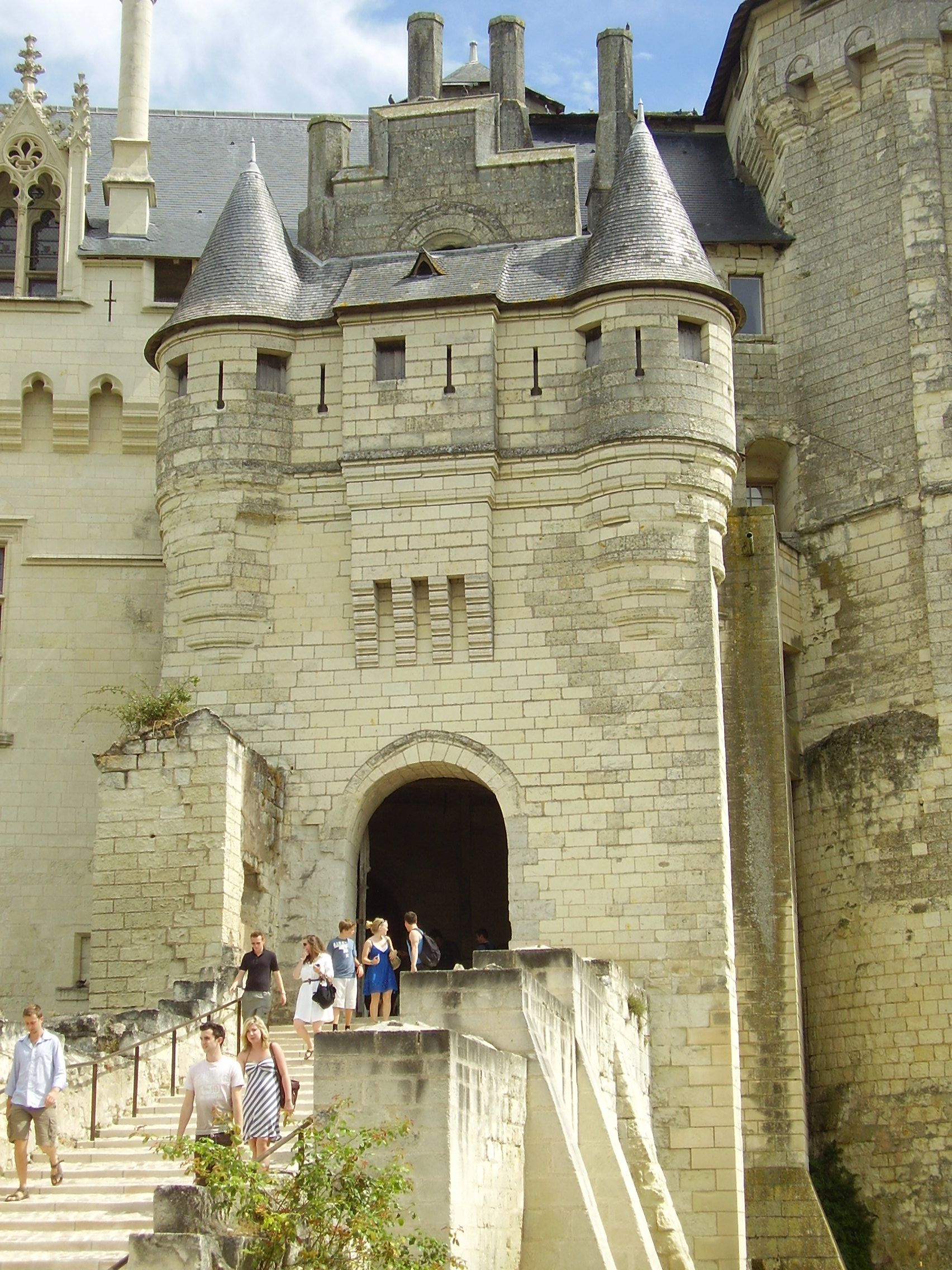 Château de Saumur, Frankreich